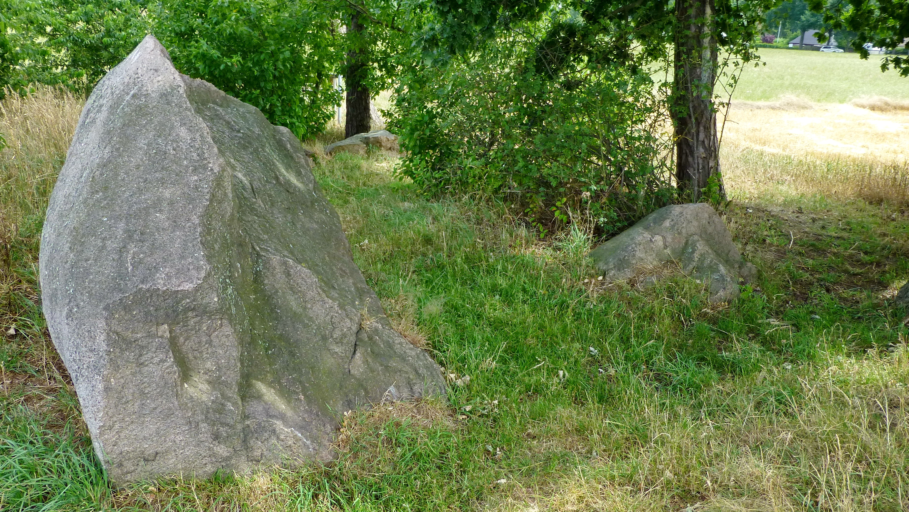 Das Naturdenkmal „Goliathstein“ (ND-H 174) liegt in einer Baumgruppe zwischen Meerstraße und K 347, östlich von Mardorf. Eine Informationstafel gibt ausführlich Auskunft über die geologischen und volkstümlichen Hintergründe dieses Findlings. Der Goliathstein wurde durch Sprengungen nach 1900 wesentlich verkleinert, einzelne abgesprengte Reste liegen um den Findling herum.